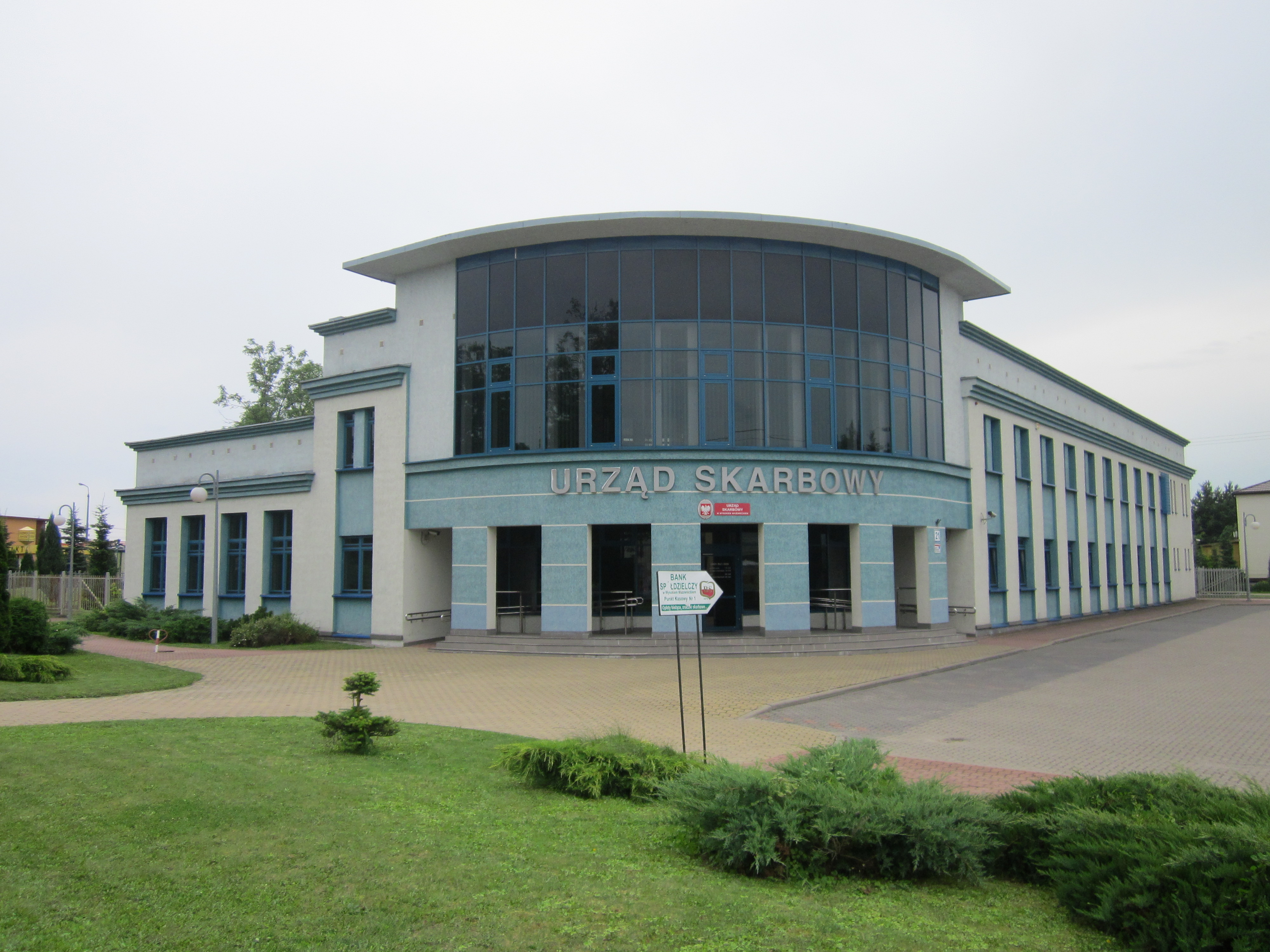 Budynek ten znajduje się przy ul. Ludowej 21.